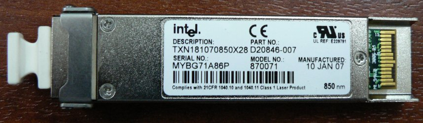 Intel XFP Transceiver (MultiMode Fiber Optics)